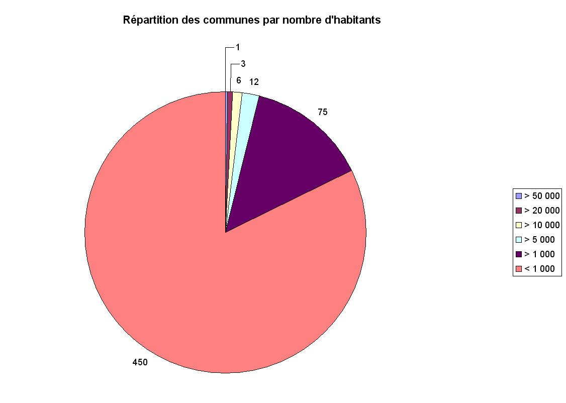 Population 2007 des Pyrénées-Atlantiques - Villes classées par nombre d'habitants